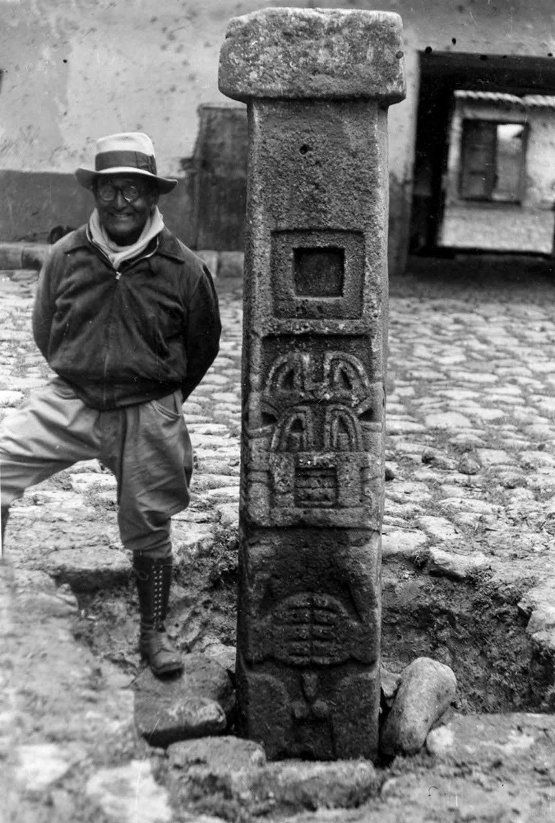 El arqueólogo peruano Julio César Tello.